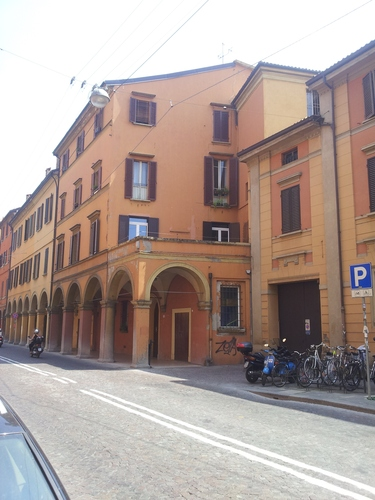 Scuola di Ostetricia in cui esercitò la sua professione Maria Dalle Donne